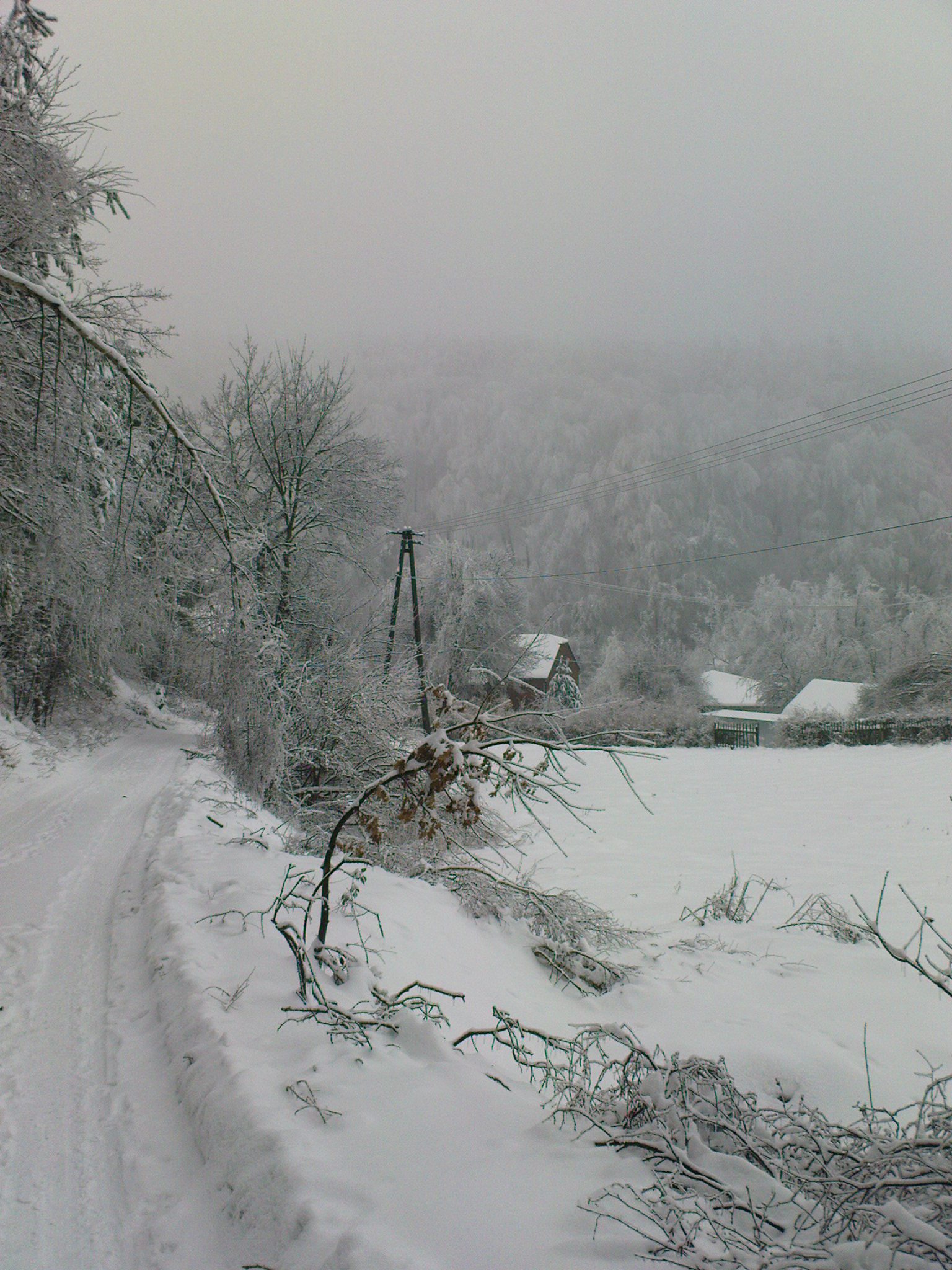 Sąspów